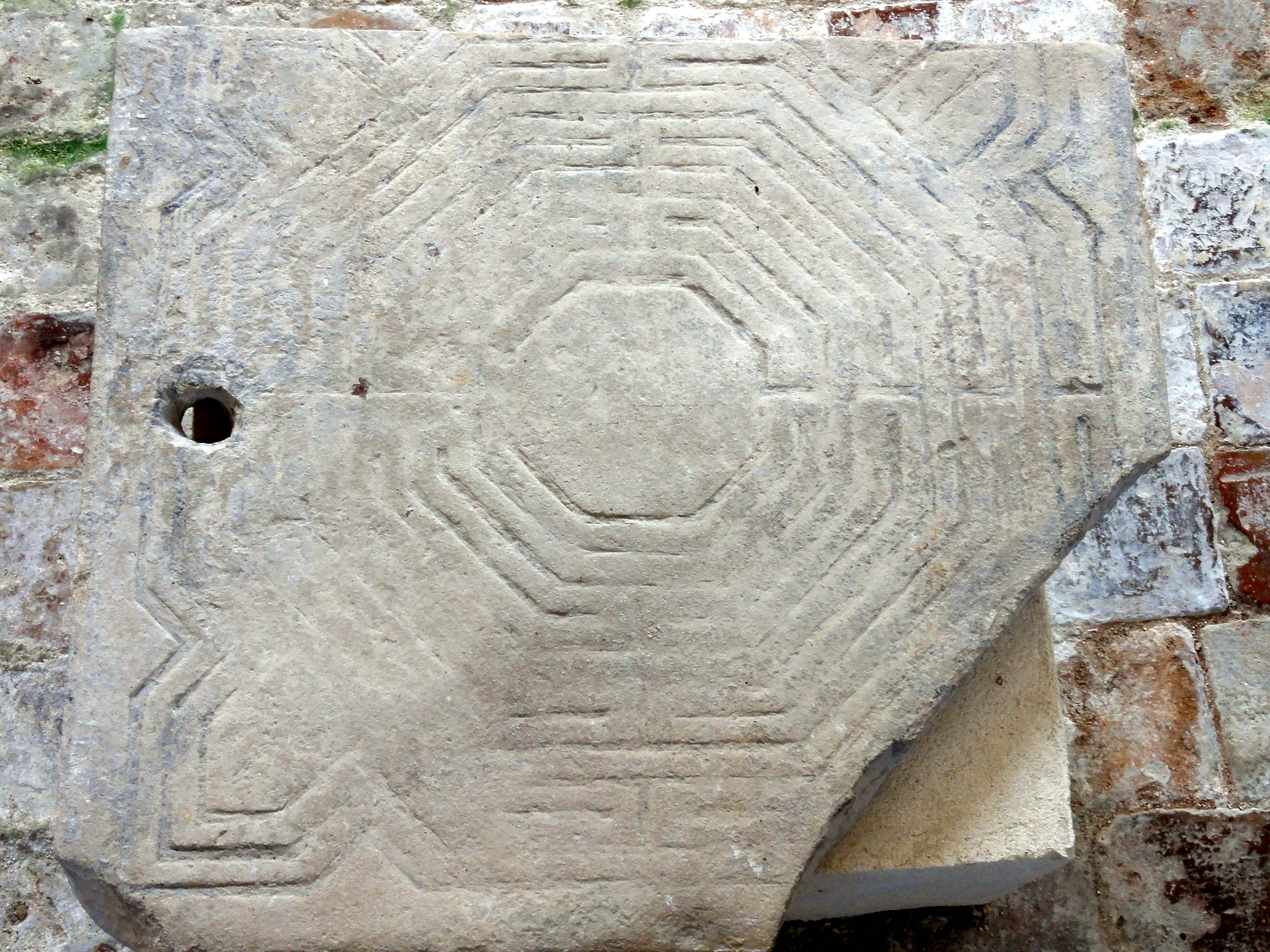 Carrelage de sol : labyrinthe.